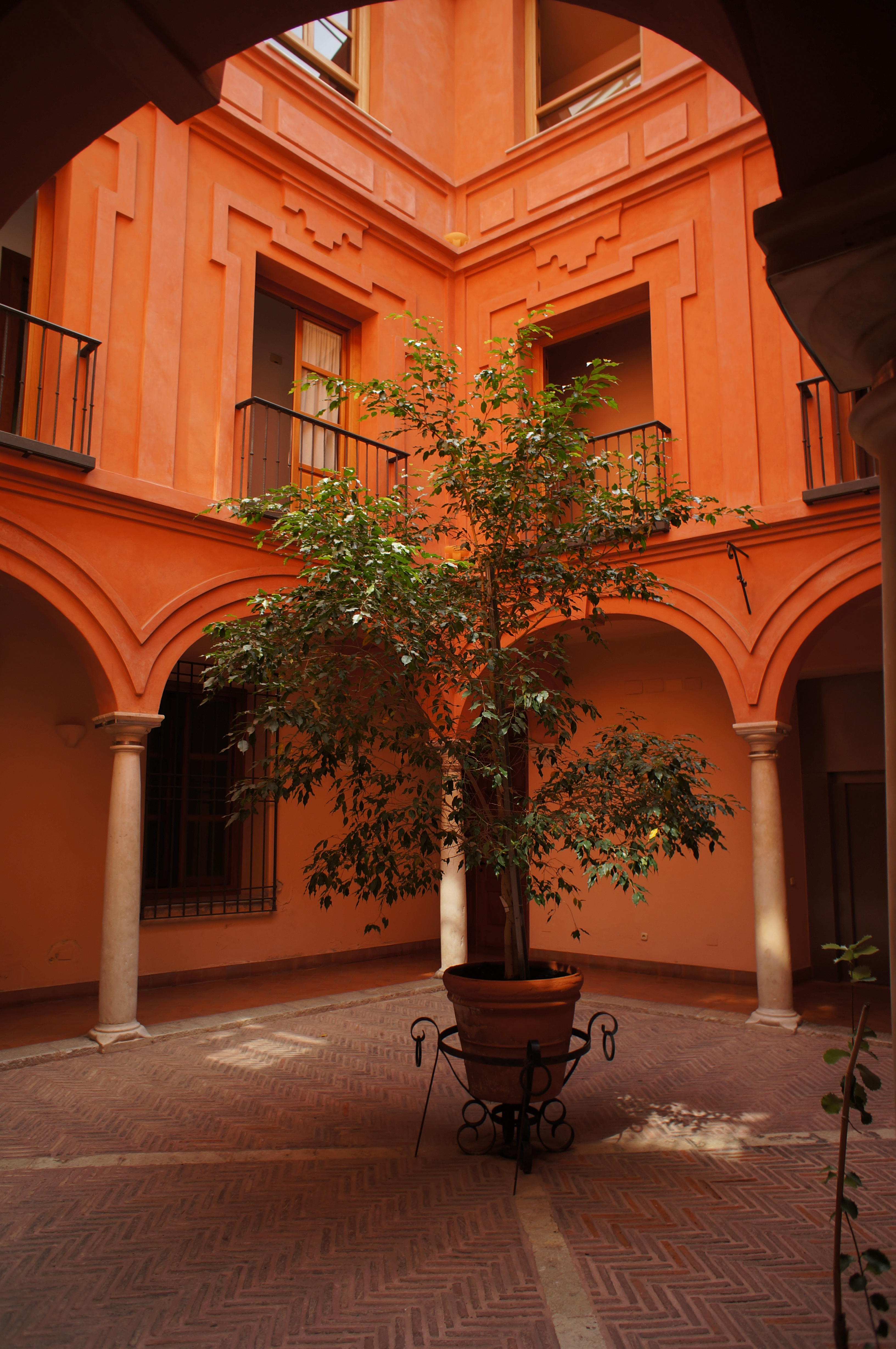 Patio Interior de la Casa Palacio de calle Salinas, 6, en Málaga (España)